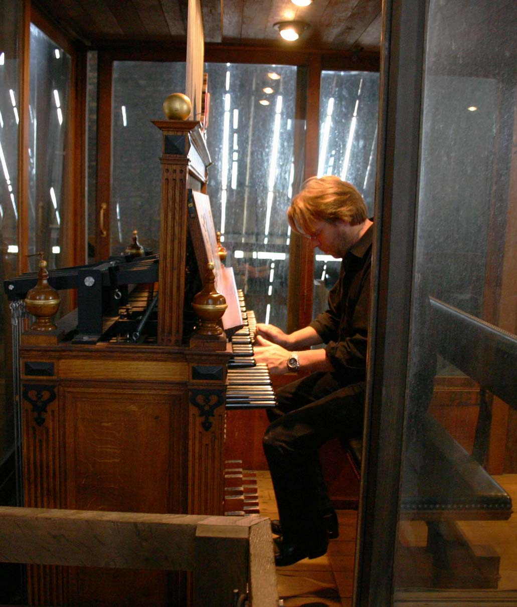 Boudewijn Zwart in Dordrecht